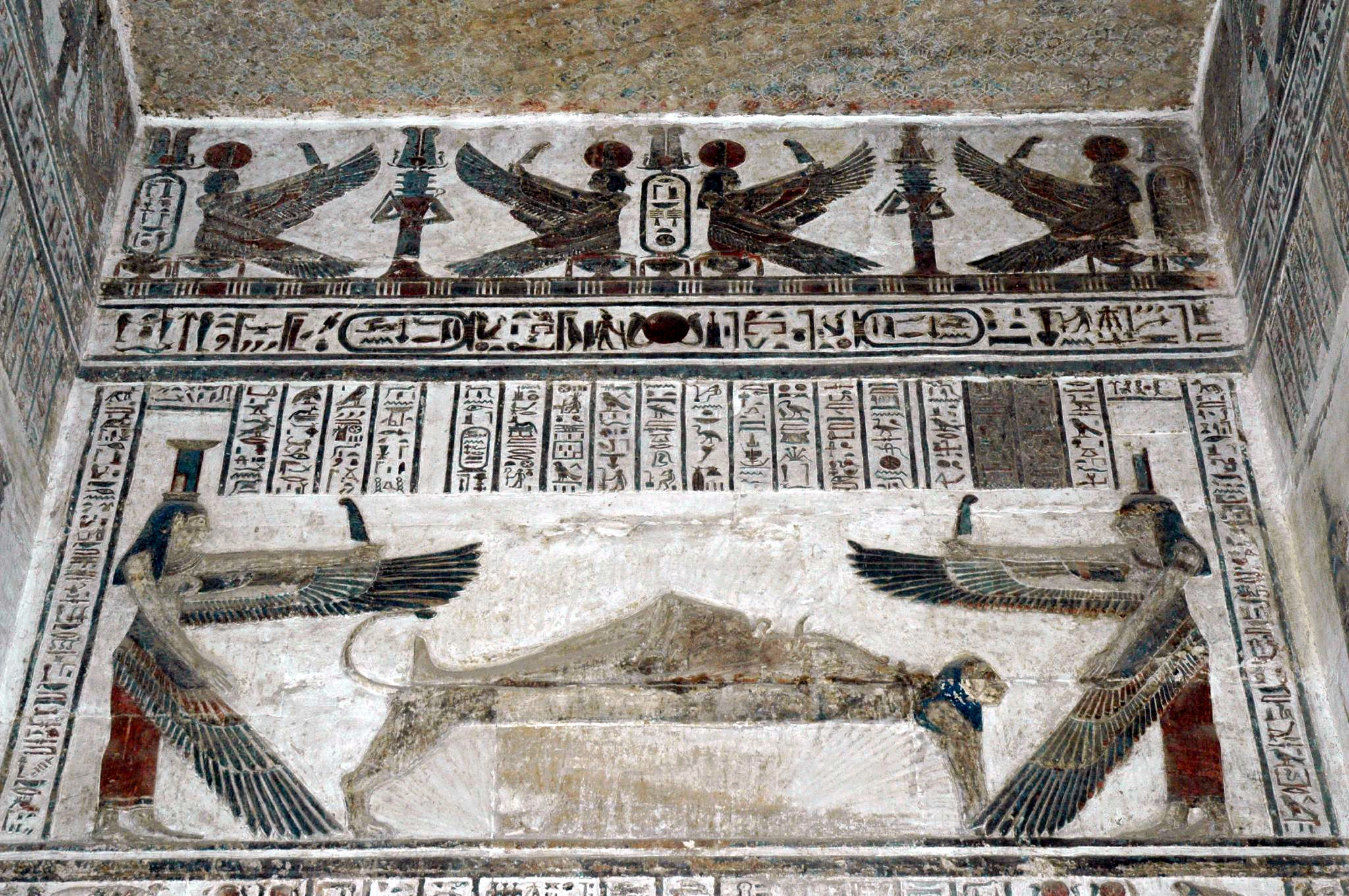 pitture molto ben conservate!